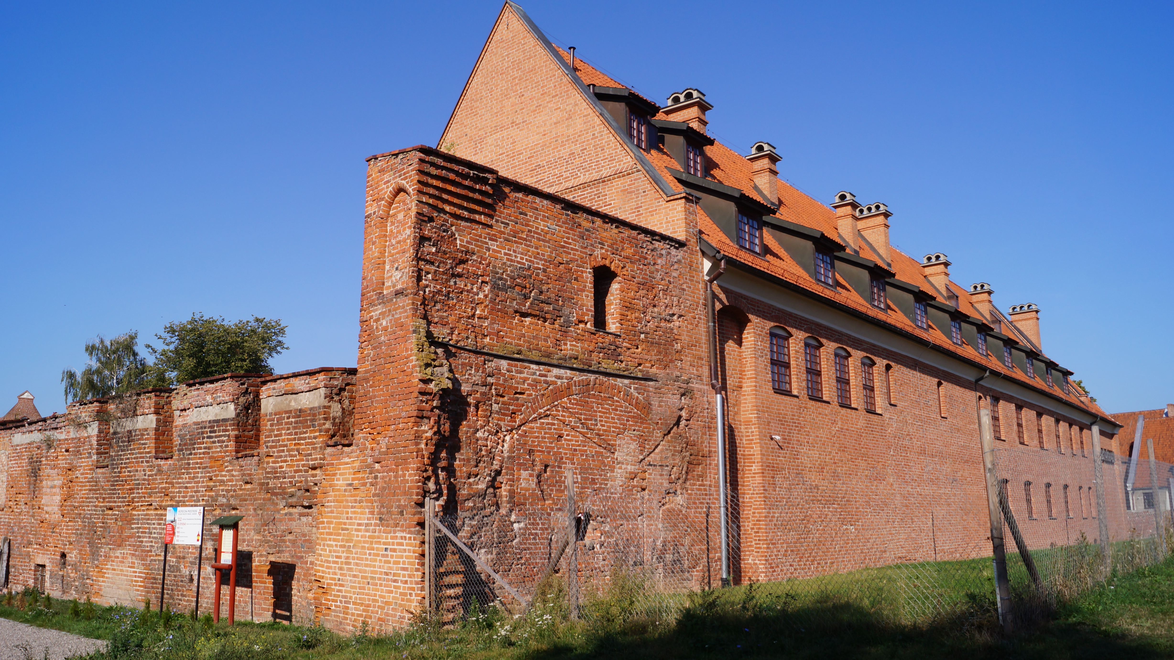 Elbląg, browar (budynek podzamcza) z murem gotyckim, XIV, XVII